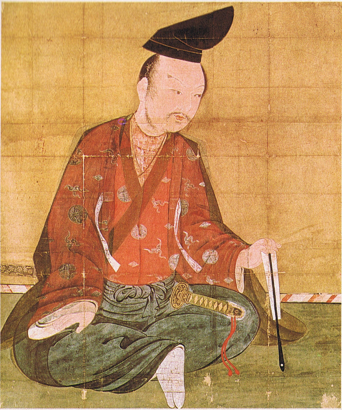 源義経（1159 - 1189）の肖像画